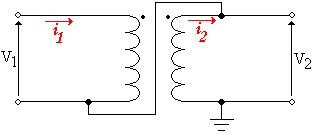 Esquema de un autotransformador